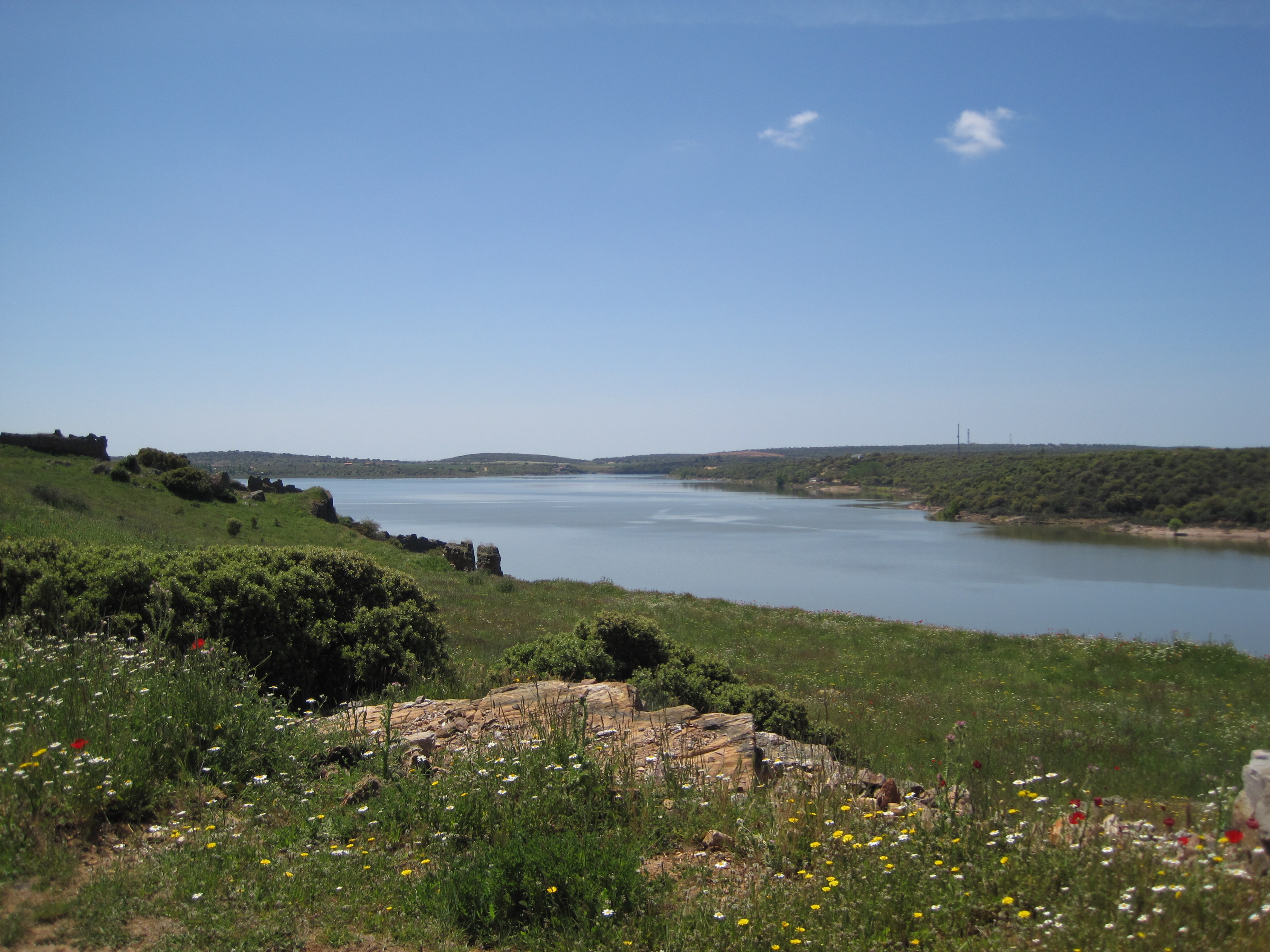 Vista del embalse de Ricobayo desde el despoblado de Castrotorafe (Zamora, España).